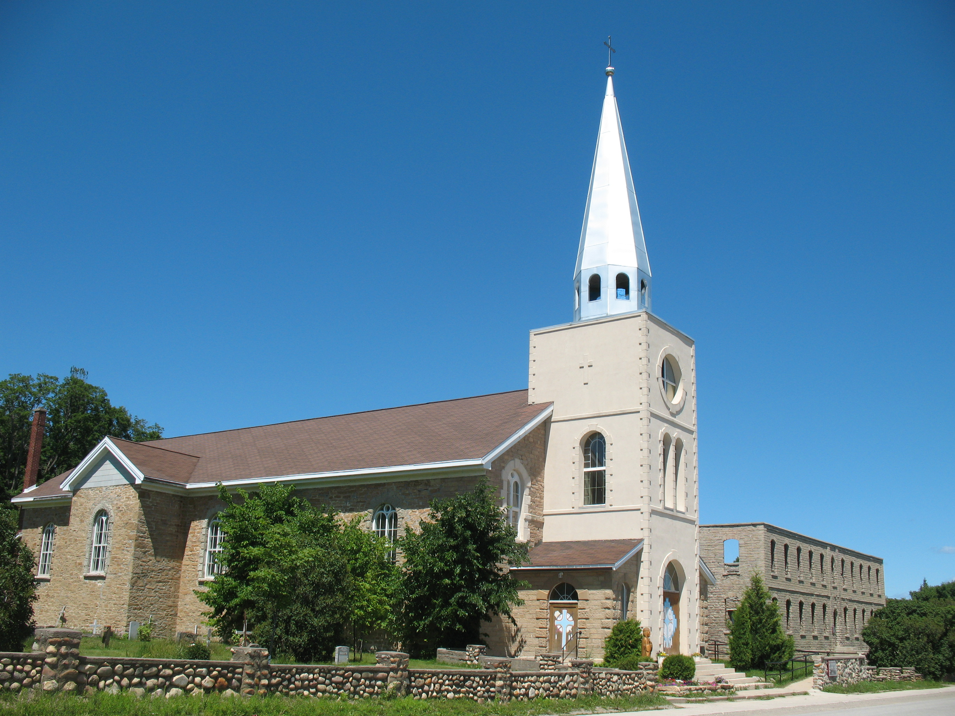 Holy Cross Mission in Wikwemikong auf Manitoulin, Ontario